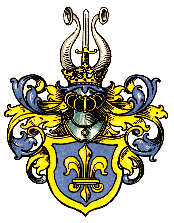 Wappen derer von Grolmann von 1741 Das Wappen von 1741 zeigt innerhalb eines goldenen Schildrandes in Blau eine goldene Lilie. Auf dem Helm mit blau-silbernen (auch blau-goldenen) Decken ein aufgerichtetes goldbegrifftes blankes Schwert zwischen zwei silbernen Büffelhörnern.